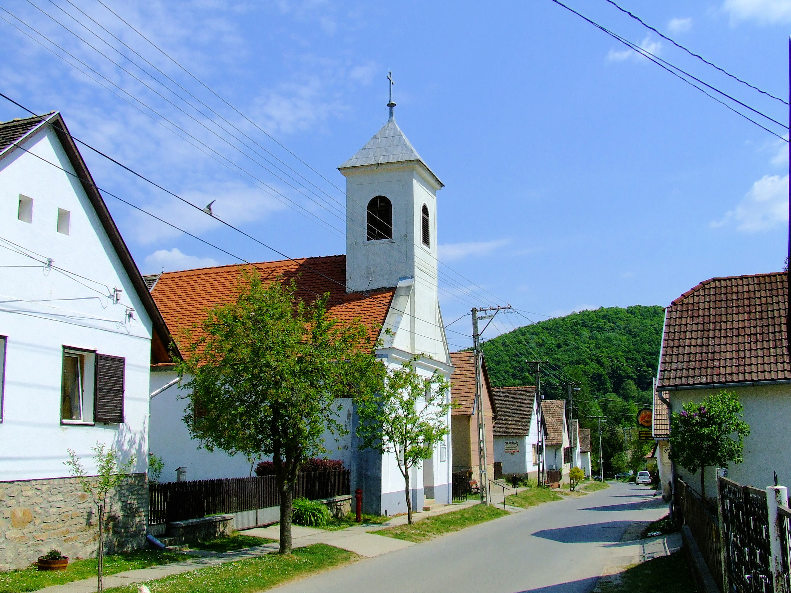 Az óbányai Boldogságos Szűz Mária Anyasága katolikus templom